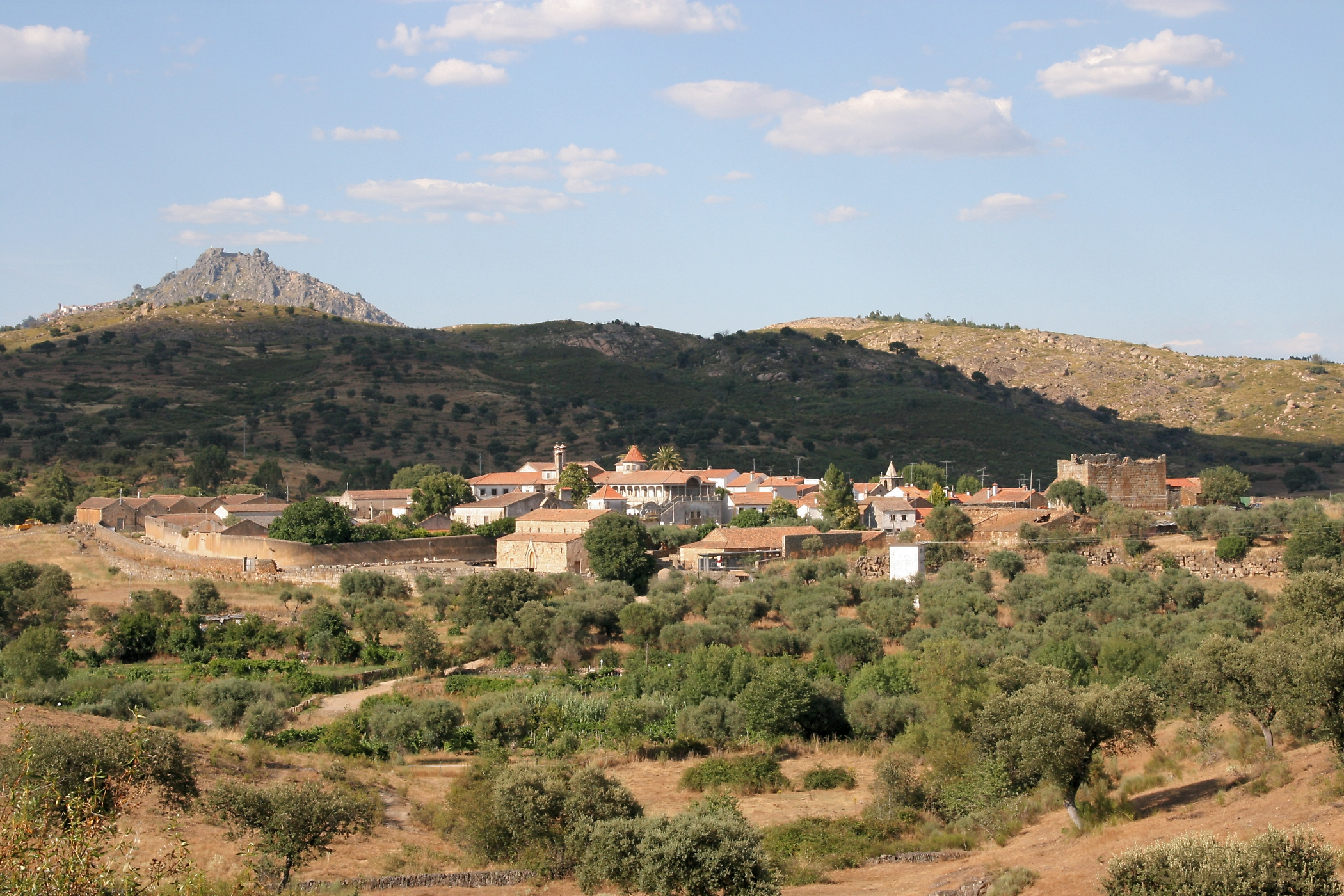 Idanha-a-Velha (Idanha-a-Nova), met op de achtergrond Monsanto